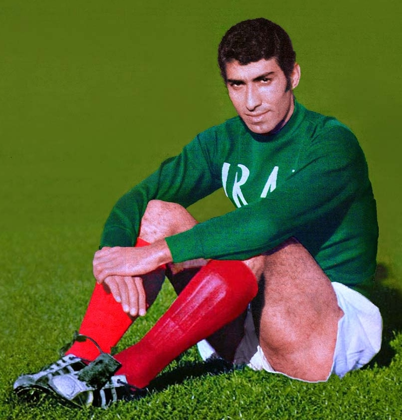 Mostafa Arab